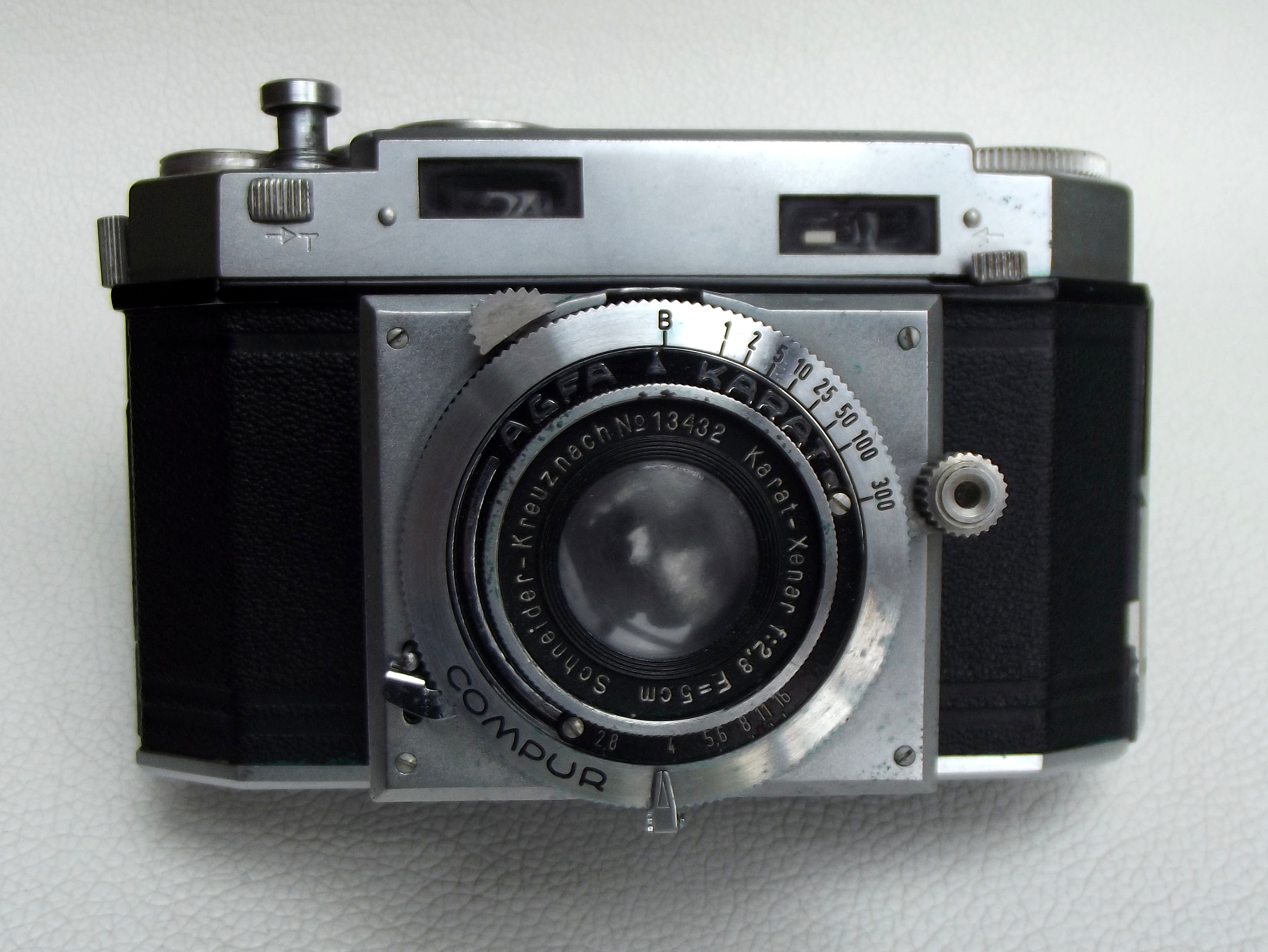 Agfa Karat 12, Frontansicht